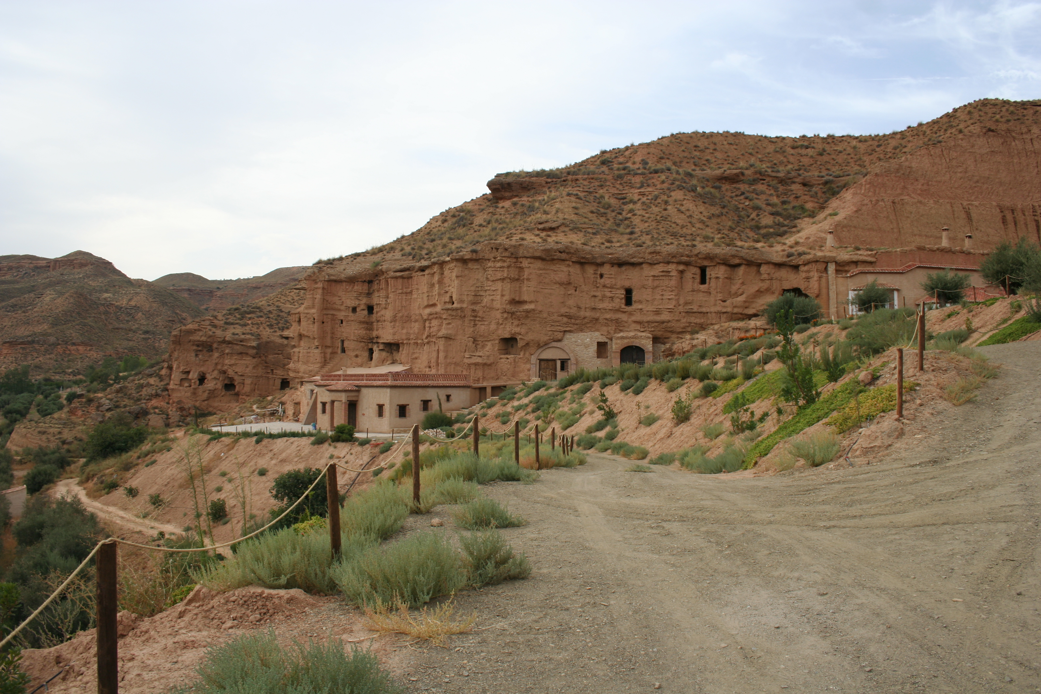 Panorámica de la zona de Cortijo Viejo Almagruz,cerca del Centro de Interpretación sobre el Hábitat Troglodita. en Purullena (Granada, España)